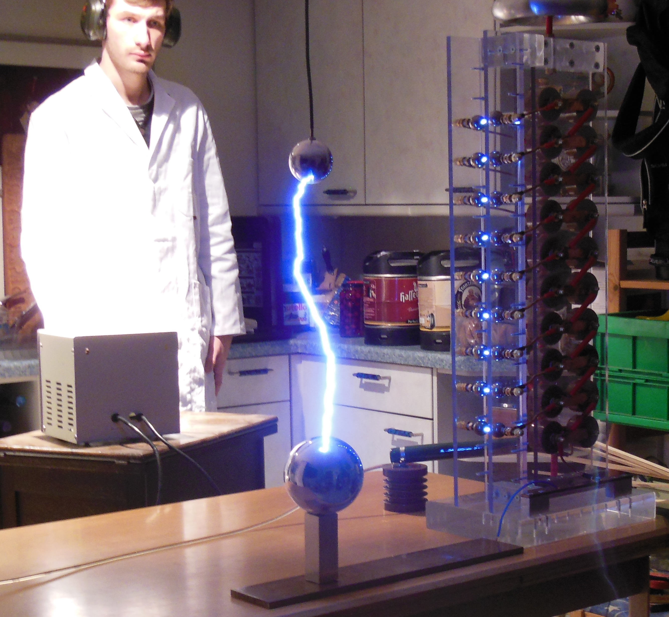 Hobbymäßig aufgebauter Marx-Generator